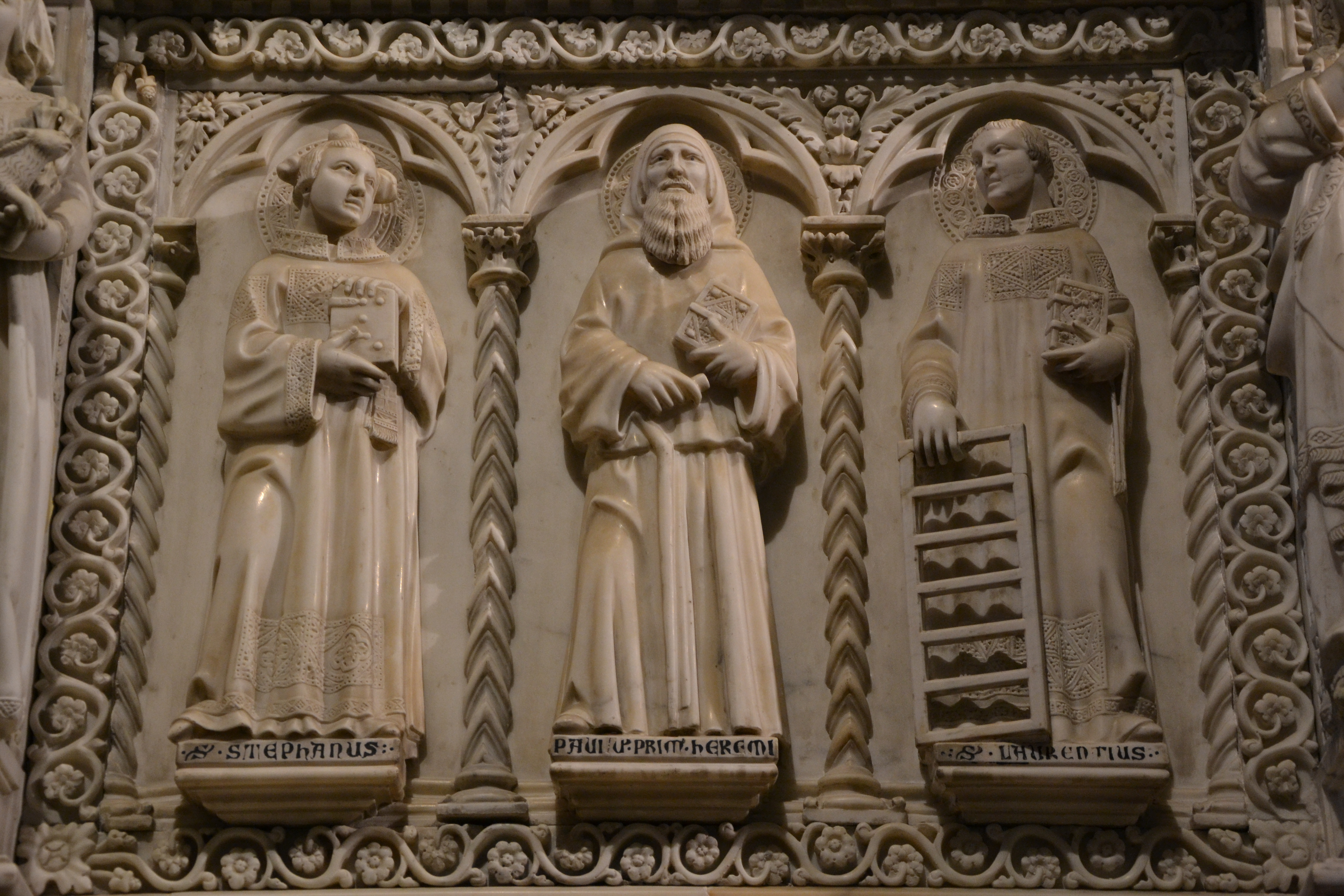 Arca marmorea di S. Agostino, Pavia, S. Pietro in Ciel d'Oro, commissionata nel 1362 da Bonifacio Bottigella, priore del convento degli Eremitani di sant'Agostino, di autori ignoti